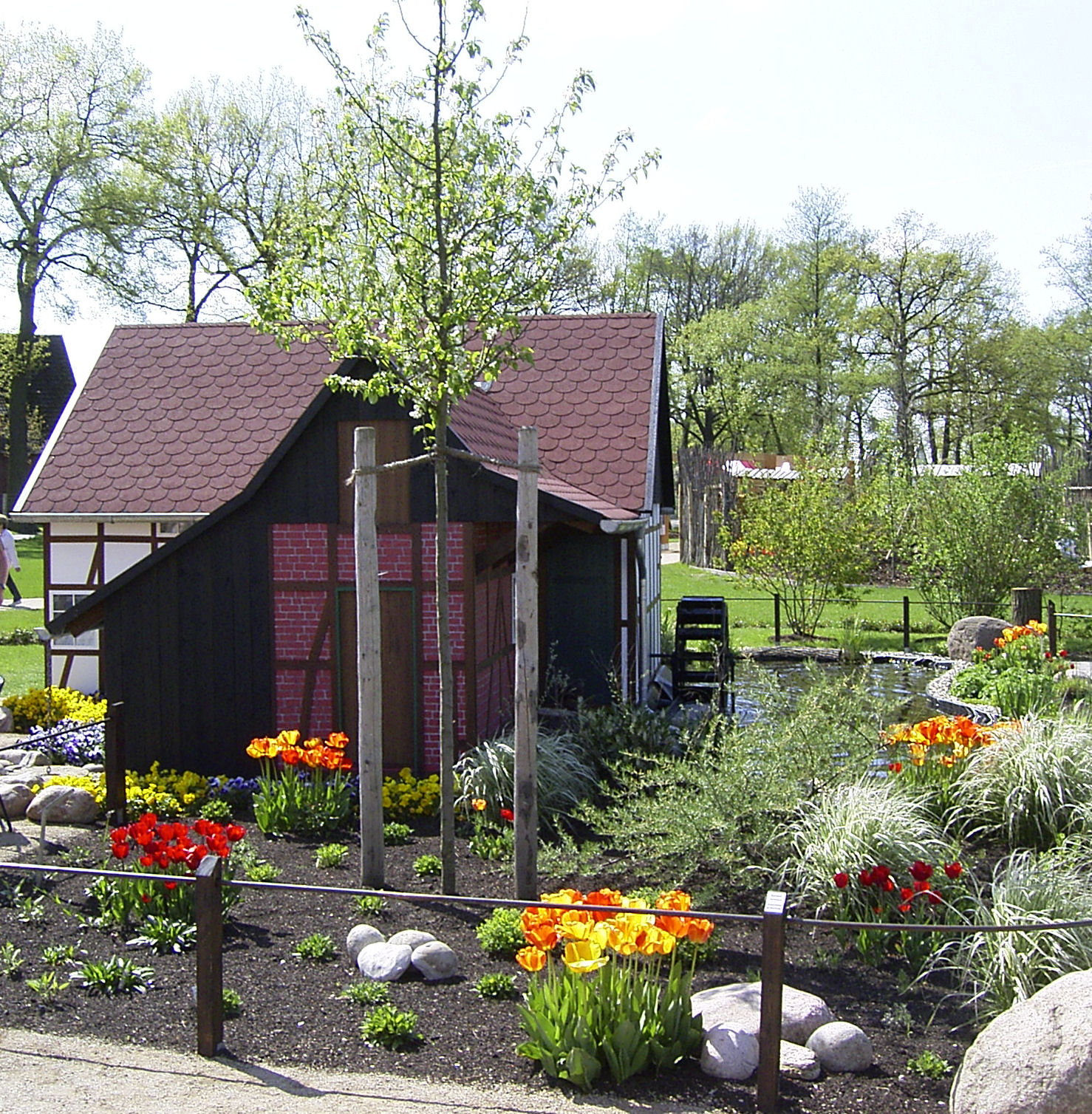 Modell der Flammenmühle als Ortsteilbeitrag auf dem Gelände der Landesgartenschau Rietberg 2008